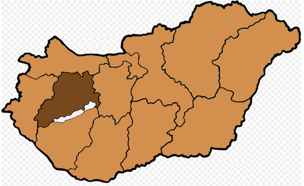 Mappa dell'arcidiocesi cattolica di Veszprem, in Ungheria. Lavoro personale eseguito da questa immagine di Commons.